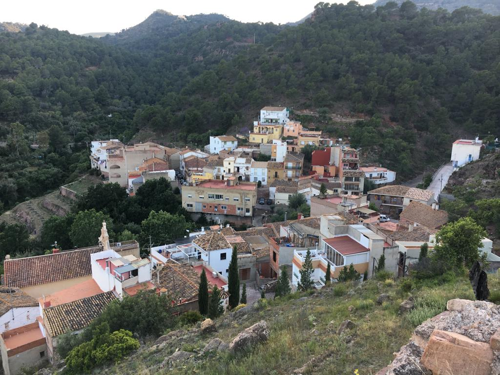 Foto del pueblo de Segart desde una de sus montañas.